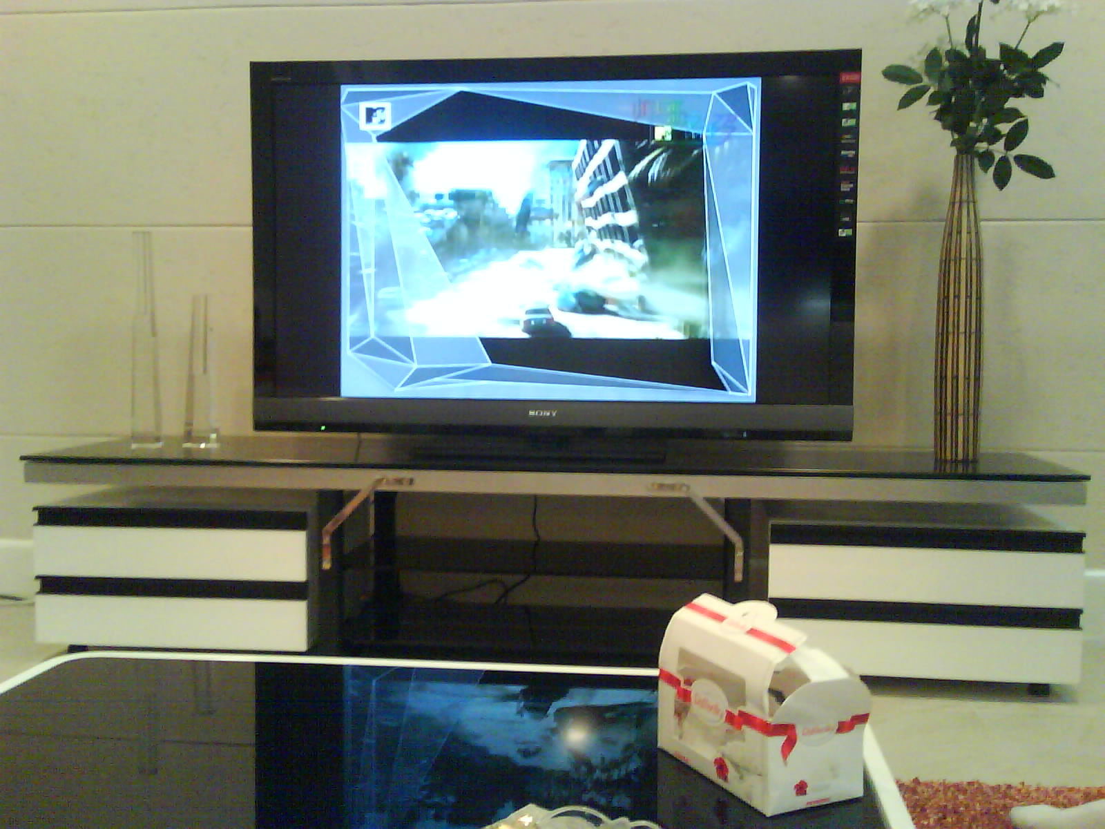 Một chiếc TV LCD của hãng Sony (mới) tại Golden Westlake